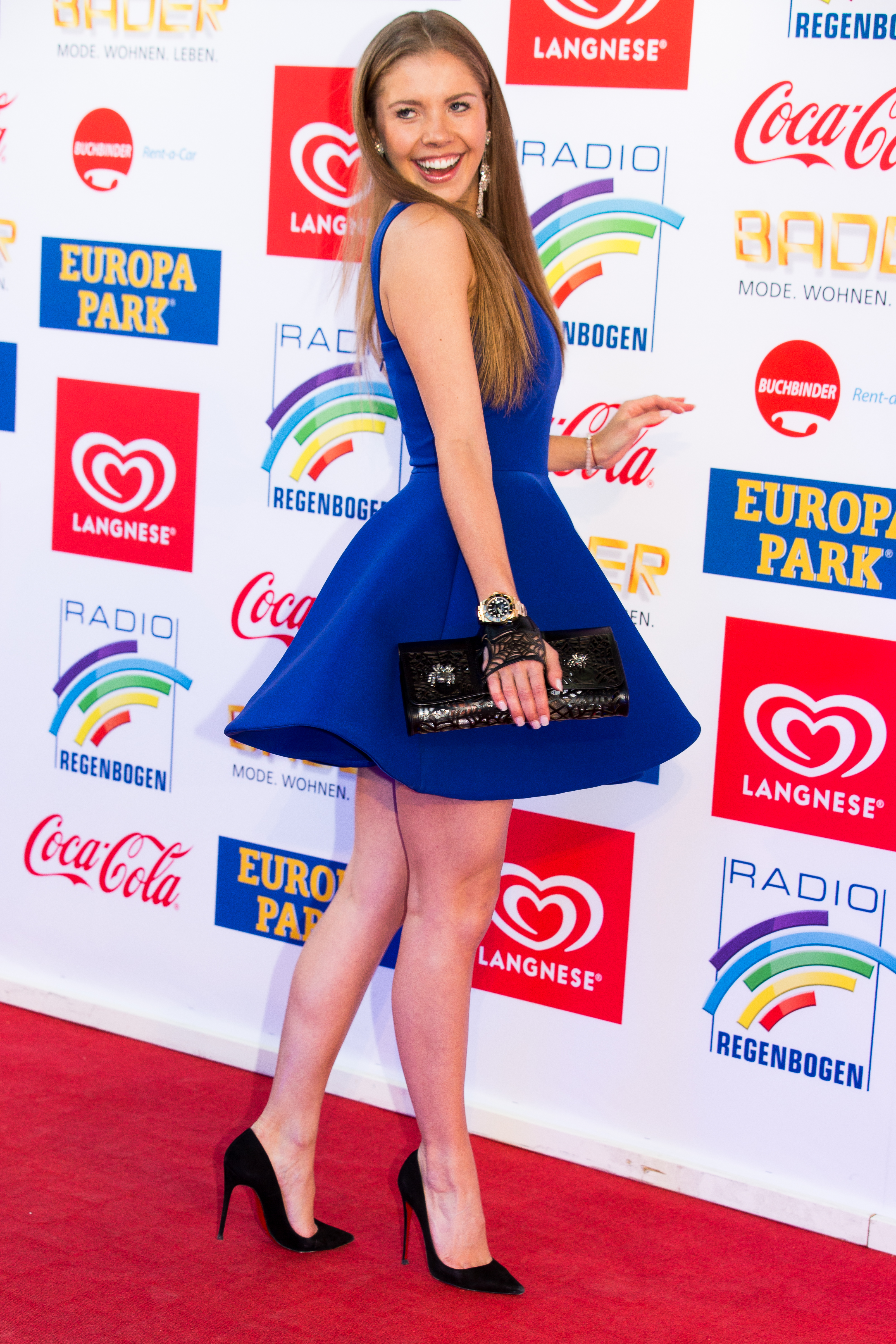 during Radio Regenbogen Award 2017 at Europapark, Rust, Baden-Württemberg, Germany on 2017-04-07, Photo: Sven Mandel